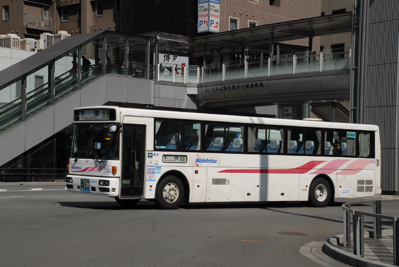 西鉄高速バス 車体後部の文字を書き換えた跡あり。